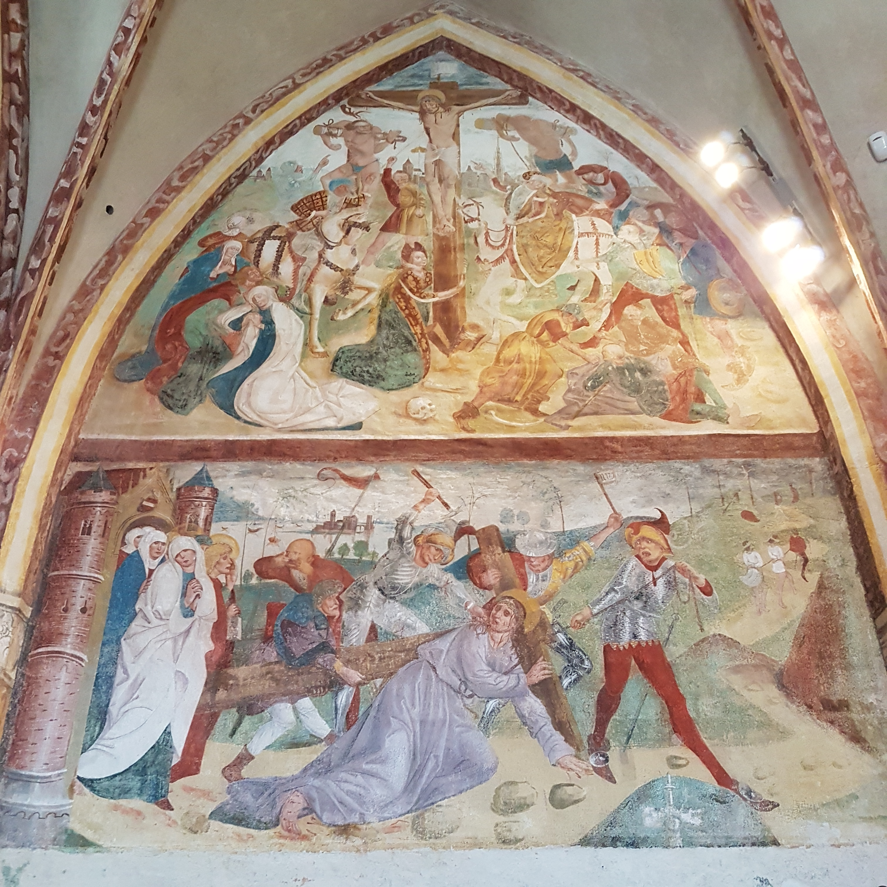 München-Pipping, St. Wolfgang, Fresko im ersten Chorjoch (rechts).